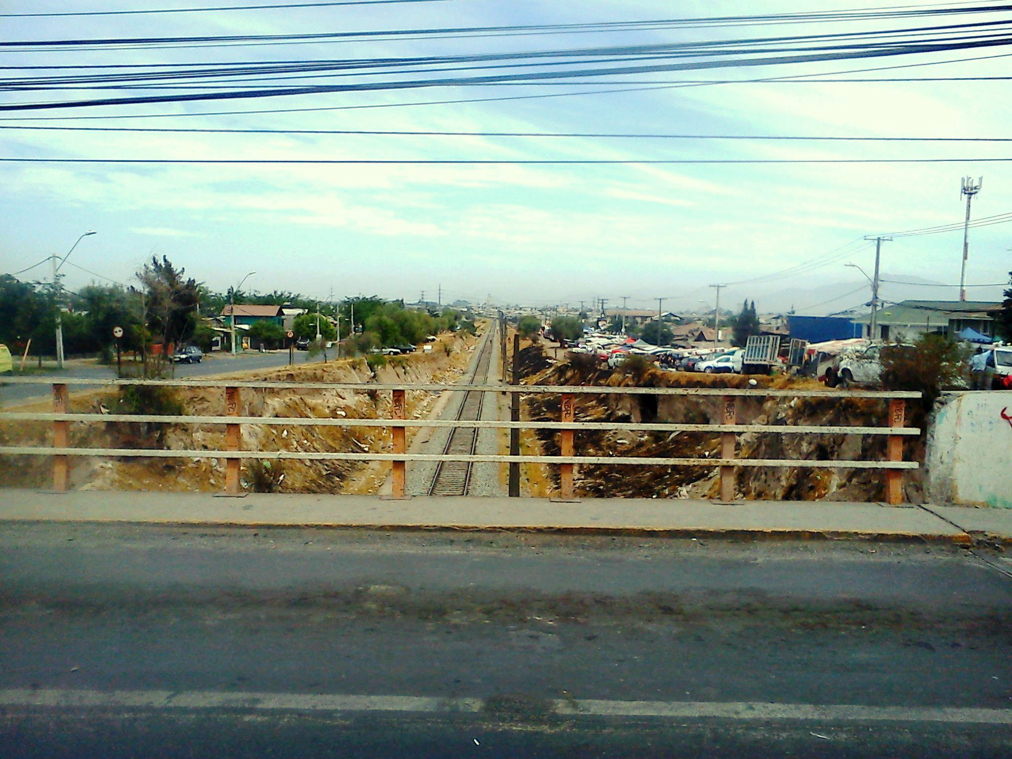 Imagen del Ramal Santiago - Cartagena, en su paso por la comuna de Cerrillos; la imagen fue tomada desde el puente Ferrocarril, de la avenida Lo Errázuriz.